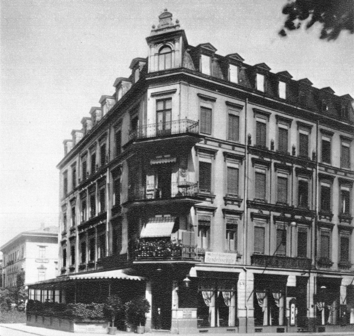 Das Café Merkur in Leipzig, Dittrichring 5. Links ein Gebäude in Lurgensteins Garten